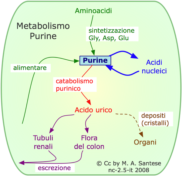 Metabolismo purine: alimentare, aminoacidi. purina, acidi nucleici, catabolismo purinico, acido urico, deposito cristalli, organi, gotta, colon, rene, escrezione